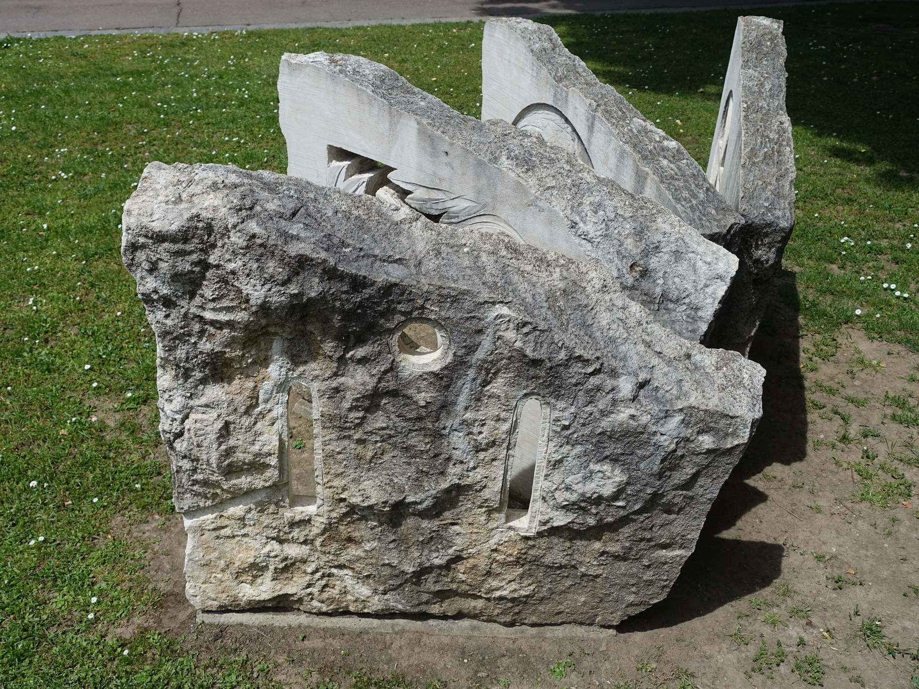 René Küng (1924), Bildhauer. Grosses Steinbuch, 1990, Lindenplatz, Allschwil, Basel-Landschaft, Schweiz